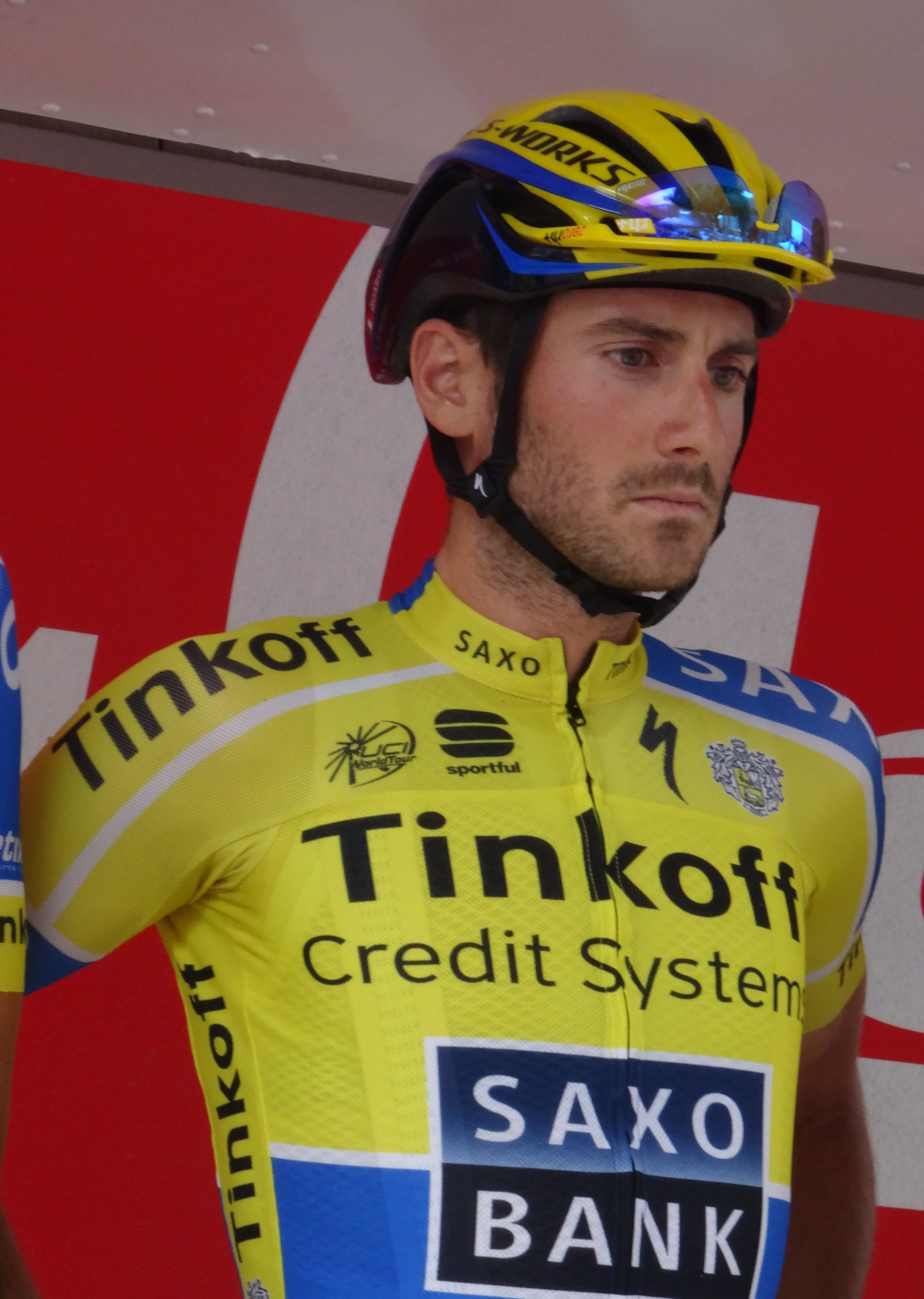 Reportage photographique réalisé le samedi 26 juillet à l'occasion du départ de la première étape du Tour de Wallonie 2014 à Frasnes-lez-Anvaing, Belgique.